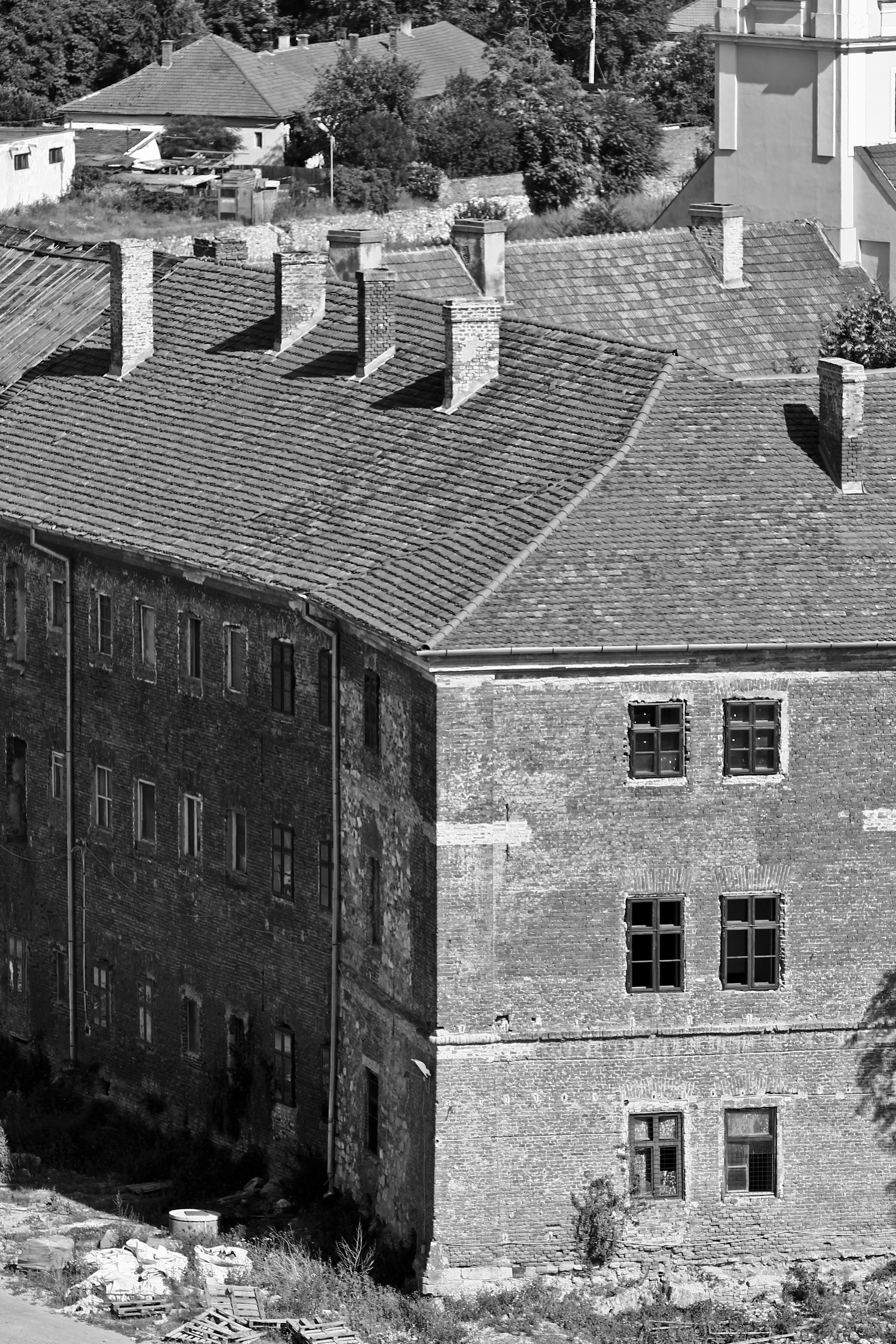 Cetatea Oradea